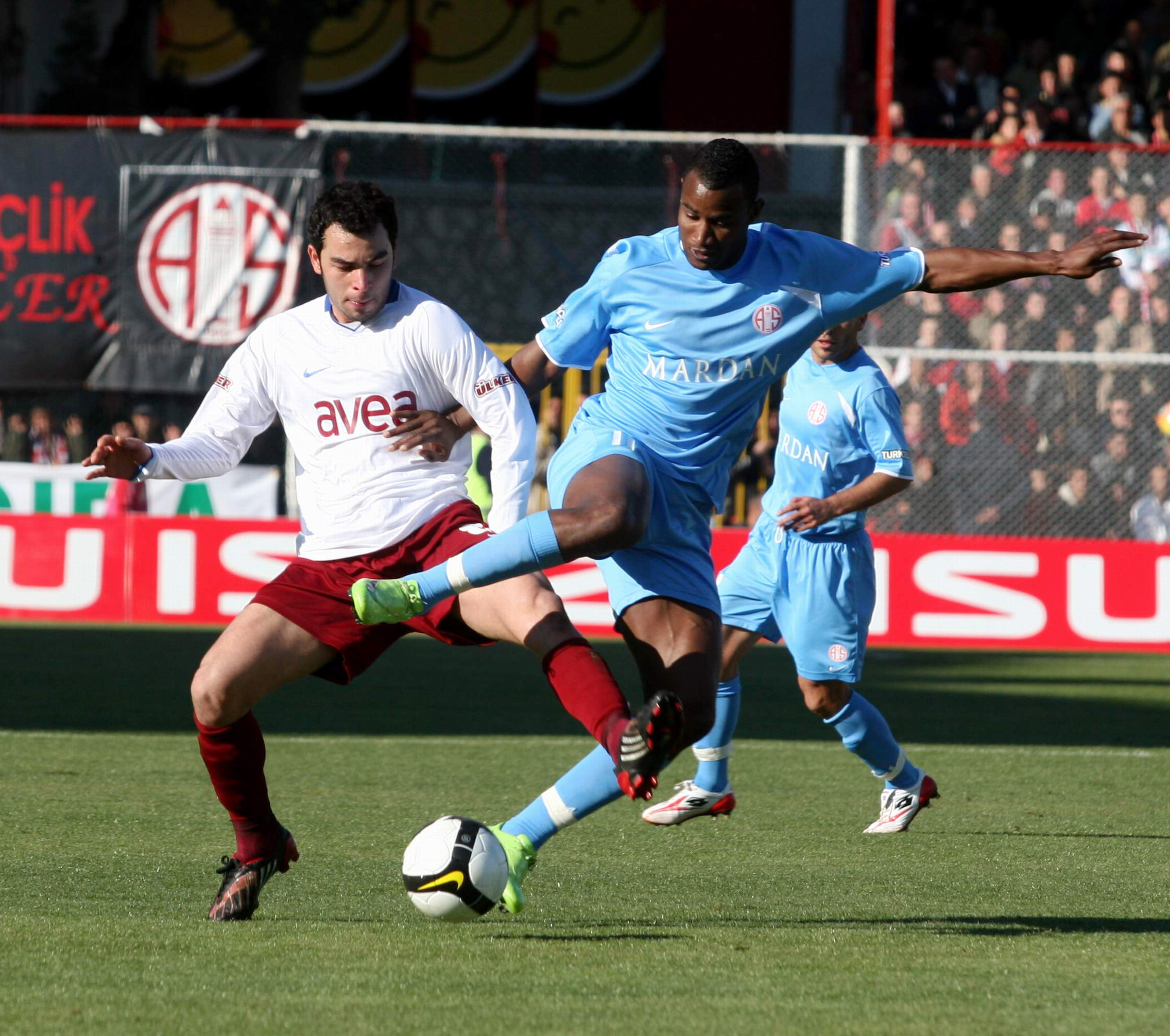 Selçuk İnan 1 Mart 2009 günü oynanan Antalyaspor müsabakasında Trabzonspor formasıyla mücadele ederken.